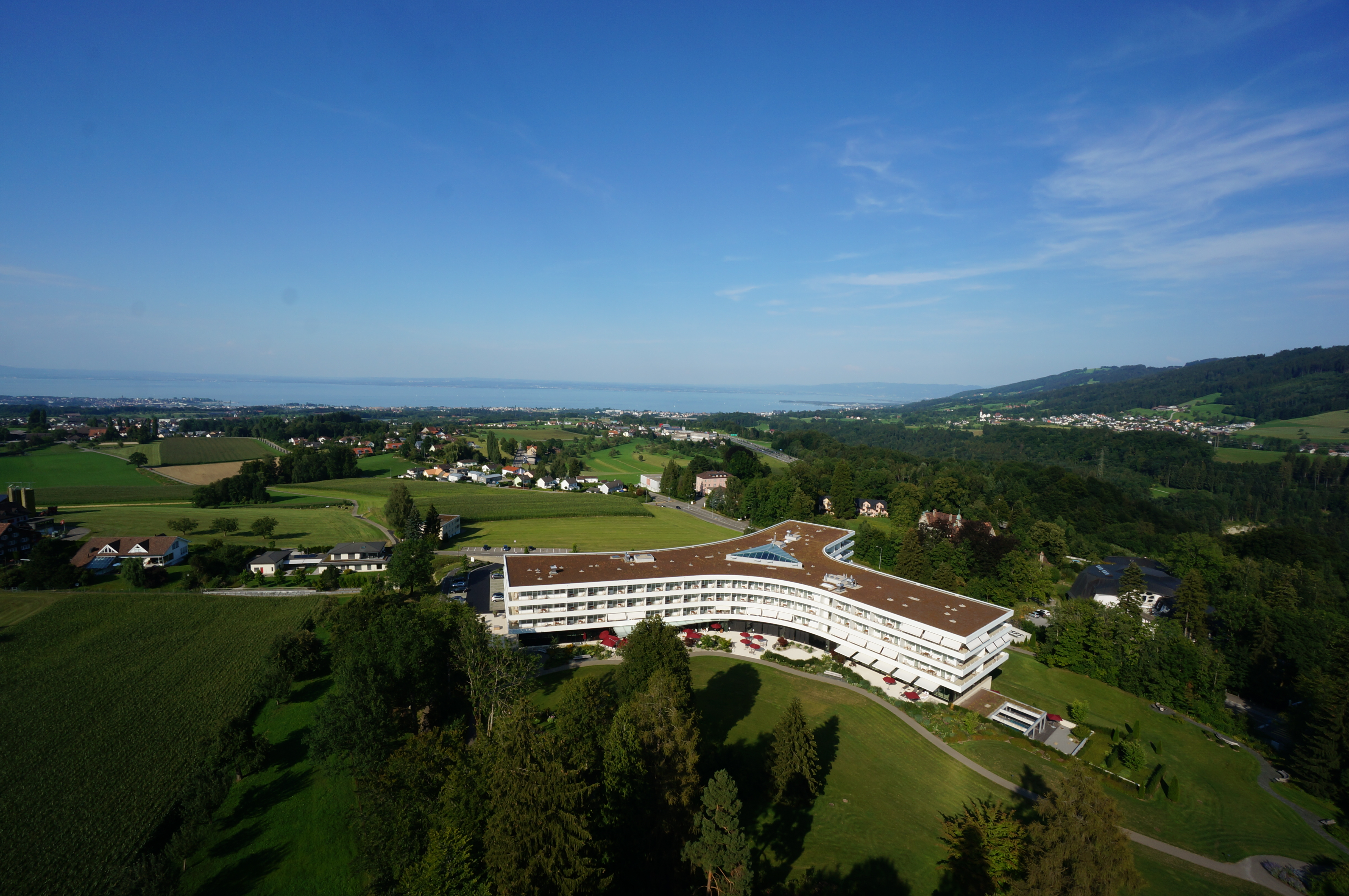 Drohnenaufnahme der Oberwaid mit Bodenseeblick